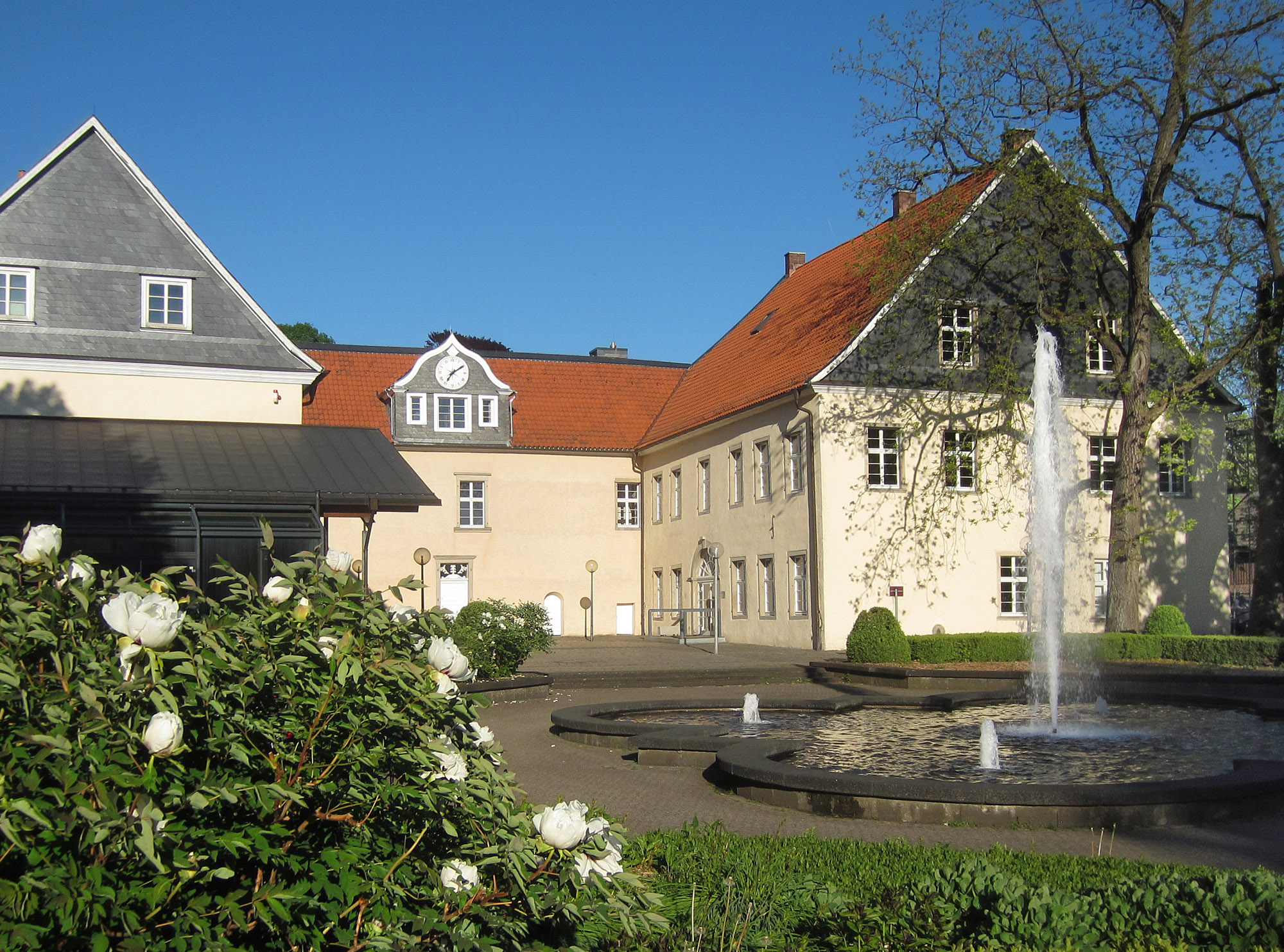 Baudenkmal Haus Martfeld, Schwelm